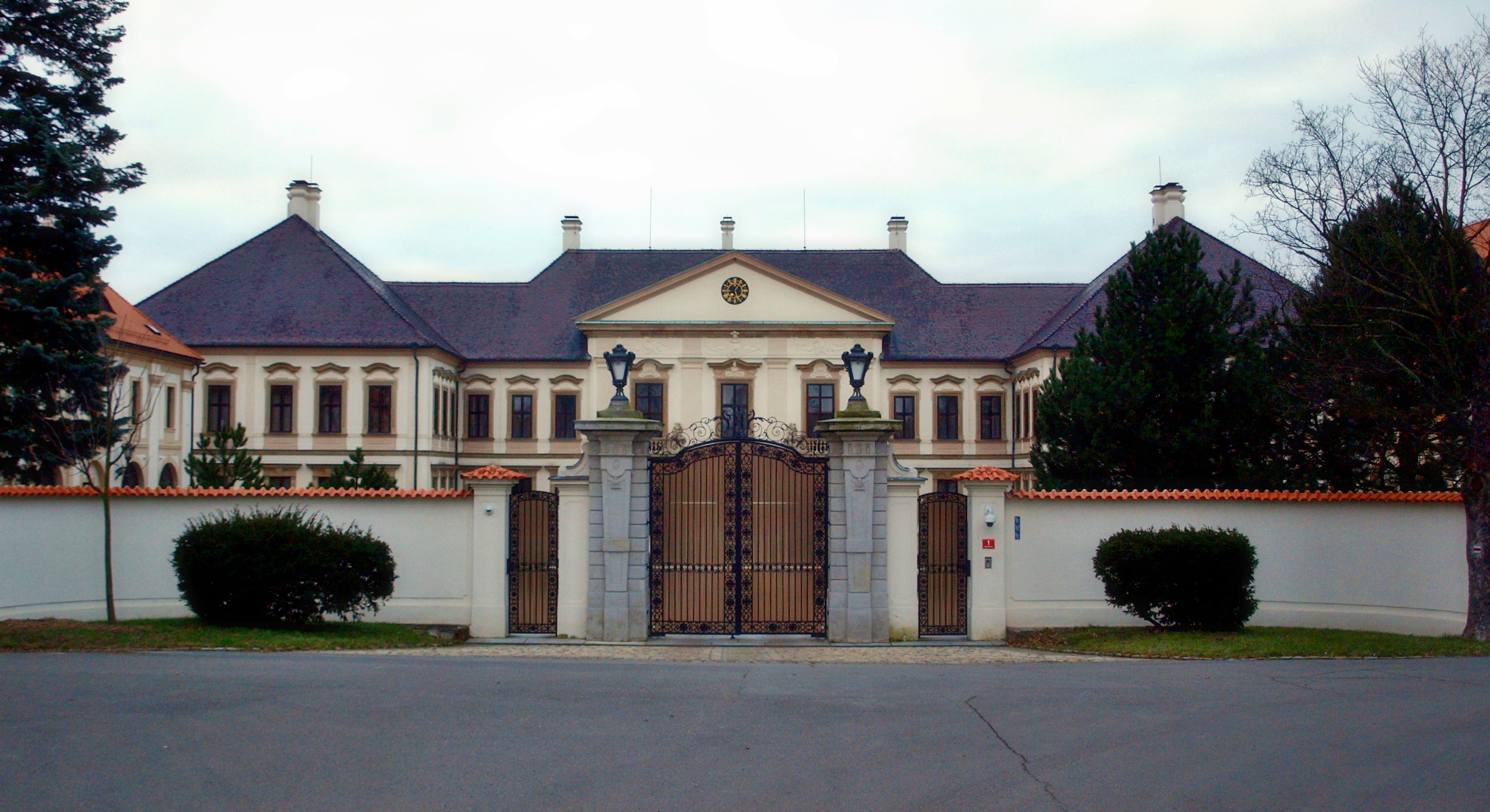 Zámek Koloděje